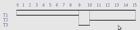 ejemplo_jsf_noely